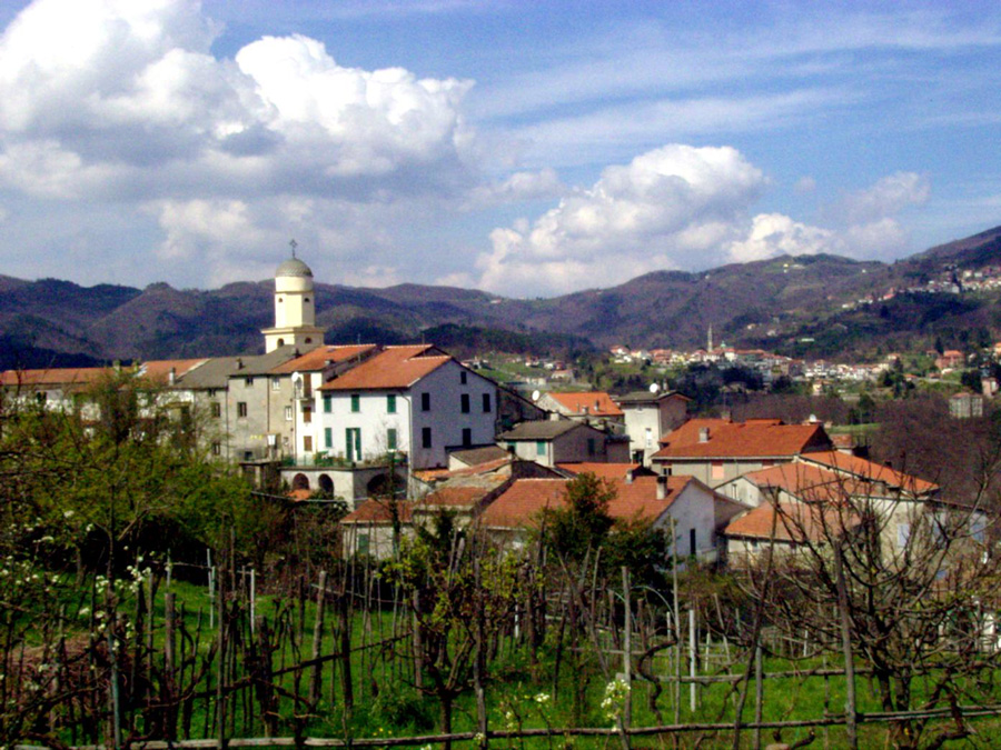 Vista del paese di Ziona, comune di Carro, alta Val di Vara